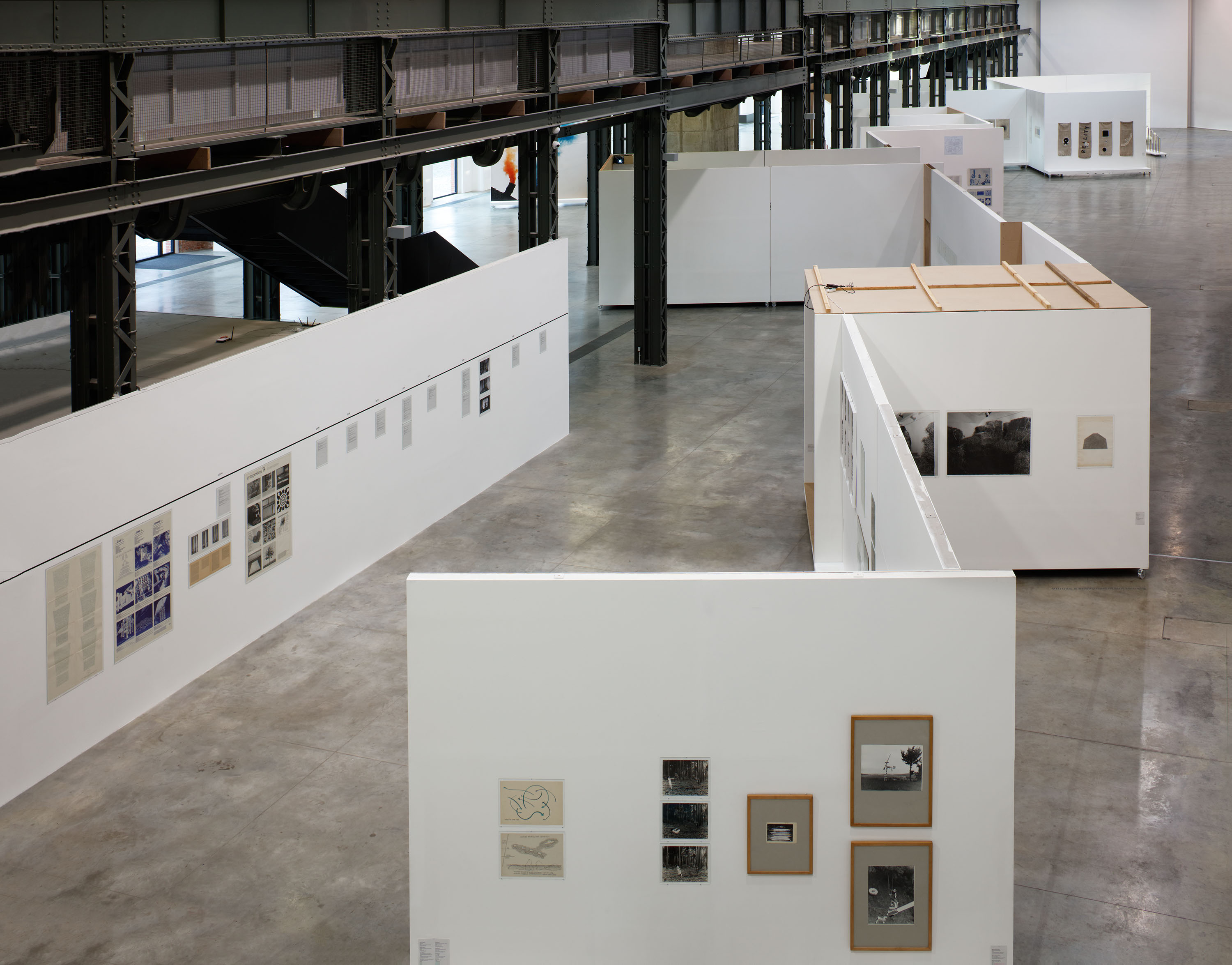 Výstava ČS koncept 70. let